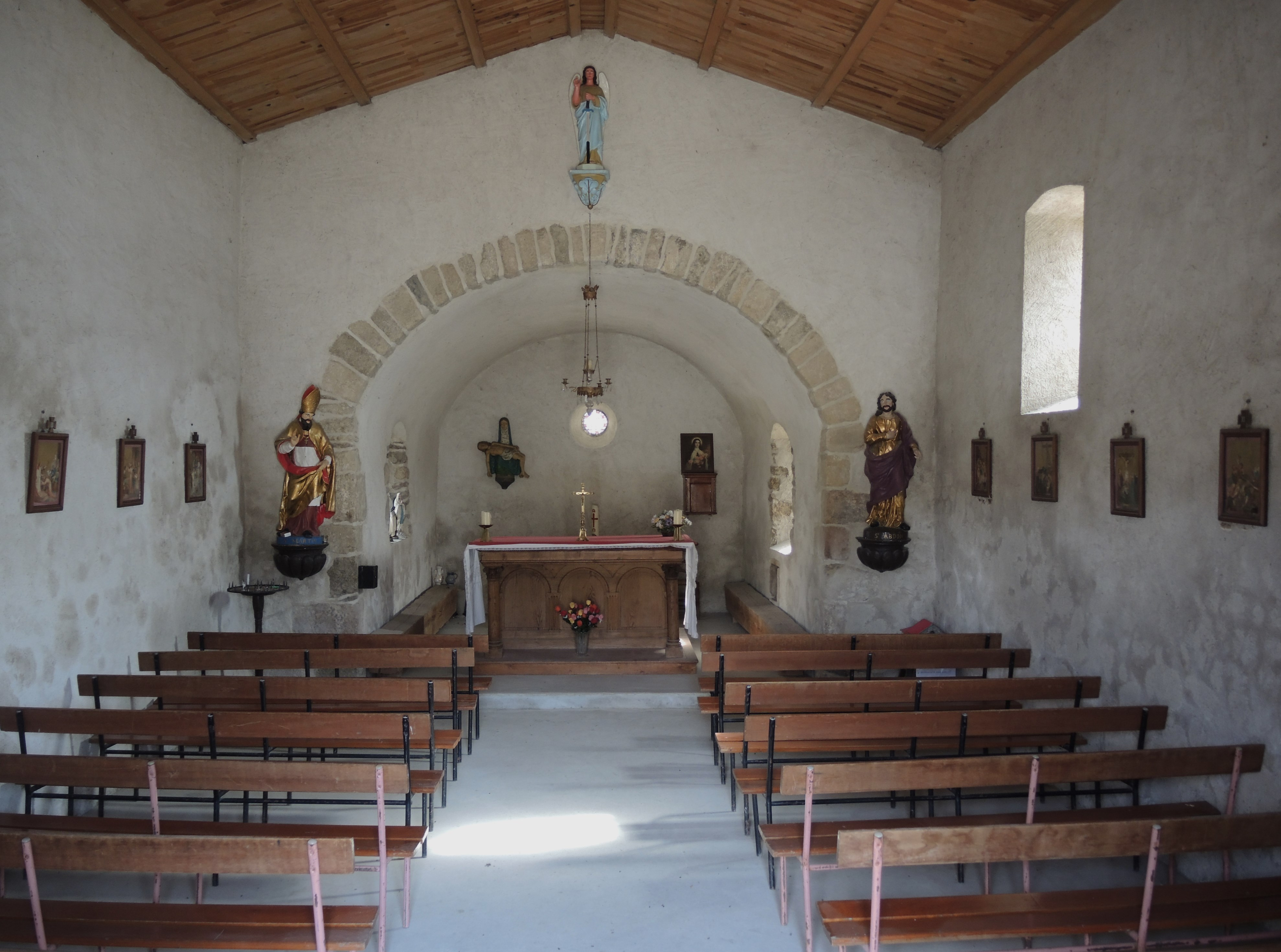 Peyraud détail